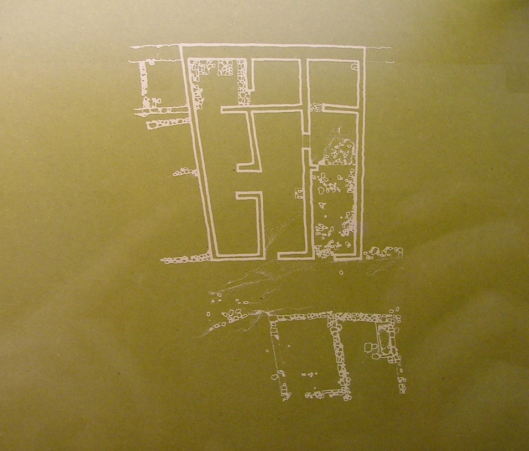 Plano de La Sena, aldea amurallada de unos 8000 m² de superficie, ubicado en el llano de Villar del Arzobispo. Las excavaciones han descubierto una almazara, un sector de viviendas adosadas a la muralla y una secuencia estratigráfica fechada desde el siglo VI hasta el II a. C. Museo de Prehistoria de Valencia.